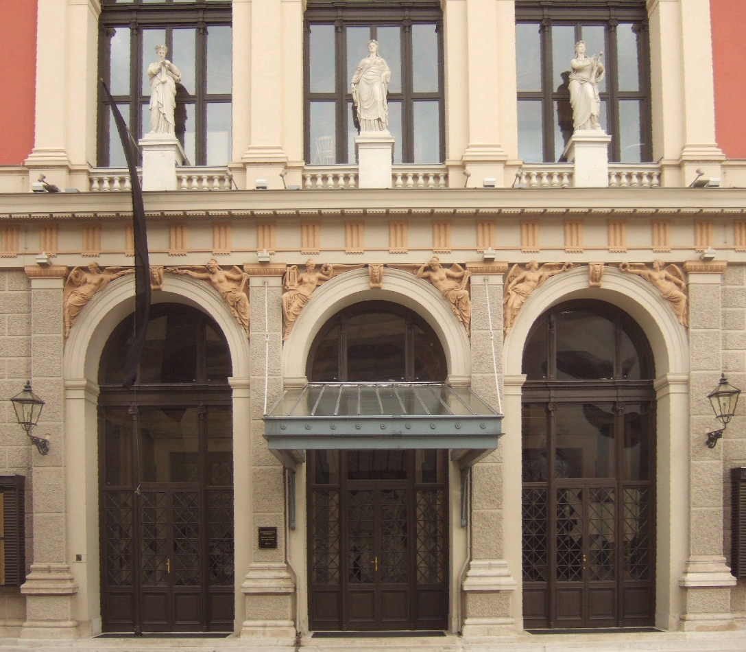 Wien: Portal des Wiener Musikvereinshauses Bei den drei Statuen, die ins Frontportal des Musikvereinsgebäudes integriert sind, handelt es sich laut dem 1872 erschienenen ersten Musikvereinsführer um: Die komponierende Musik Die ausübende Musik Die Dichtkunst Diesen drei personifizierten Ideen ist demnach das Haus gewidmet. Früher fanden im Musikverein weit mehr literarische Veranstaltungen und Lesungen statt. In dem im Musikverein untergebrachten Konservatorium der Gesellschaft der Musikfreunde gab es sogar eine eigene Abteilung für die Ausbildung von Schauspielern, daher auch die Statue für die Dichtkunst.